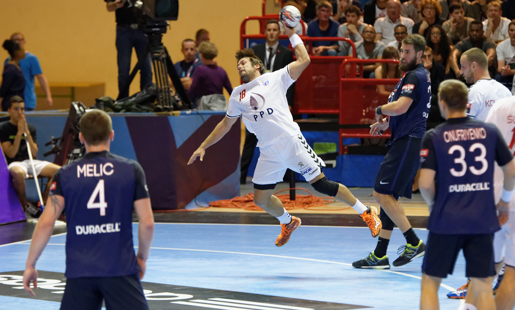 Rencontre de phase de groupe de la ligue des champions 2015-16 entre le PSG et le RK Zagreb. A la Halle Carpentier (Paris), le 11 ocotbre 2015.